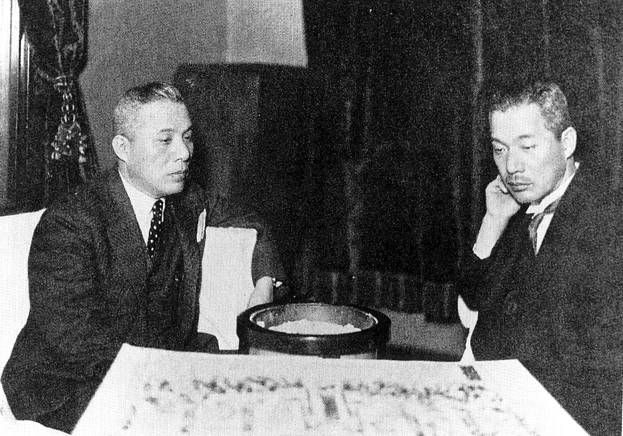 松竹(Shochiku)の創業者、大谷竹次郎(ŌTANI Takejirō)・白井松次郎(SHIRAI Matsujirō)。